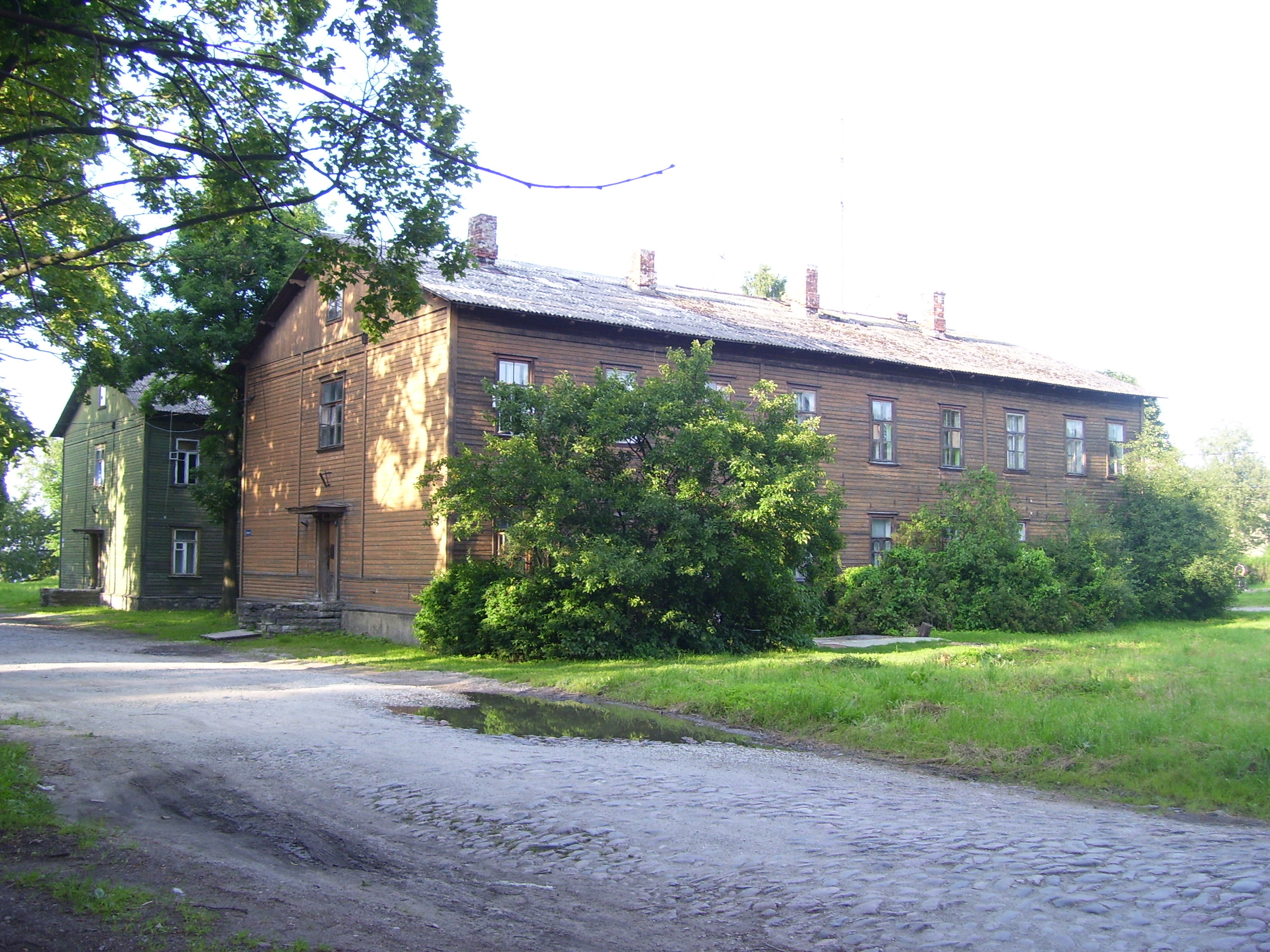 Vana Kopli, Sepa tänava põhjaots.